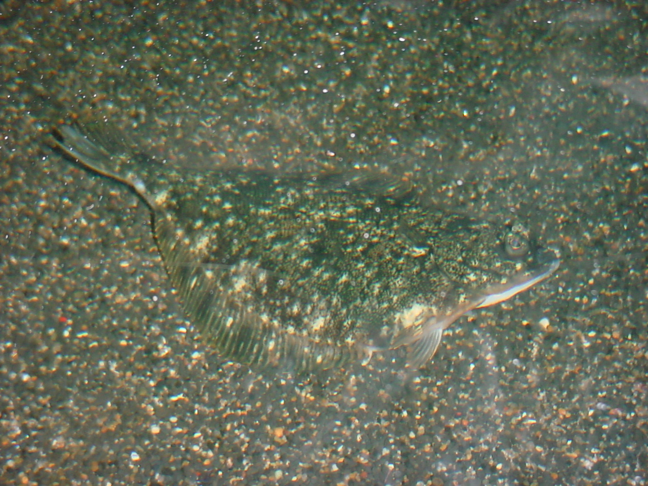 Starry Flounder